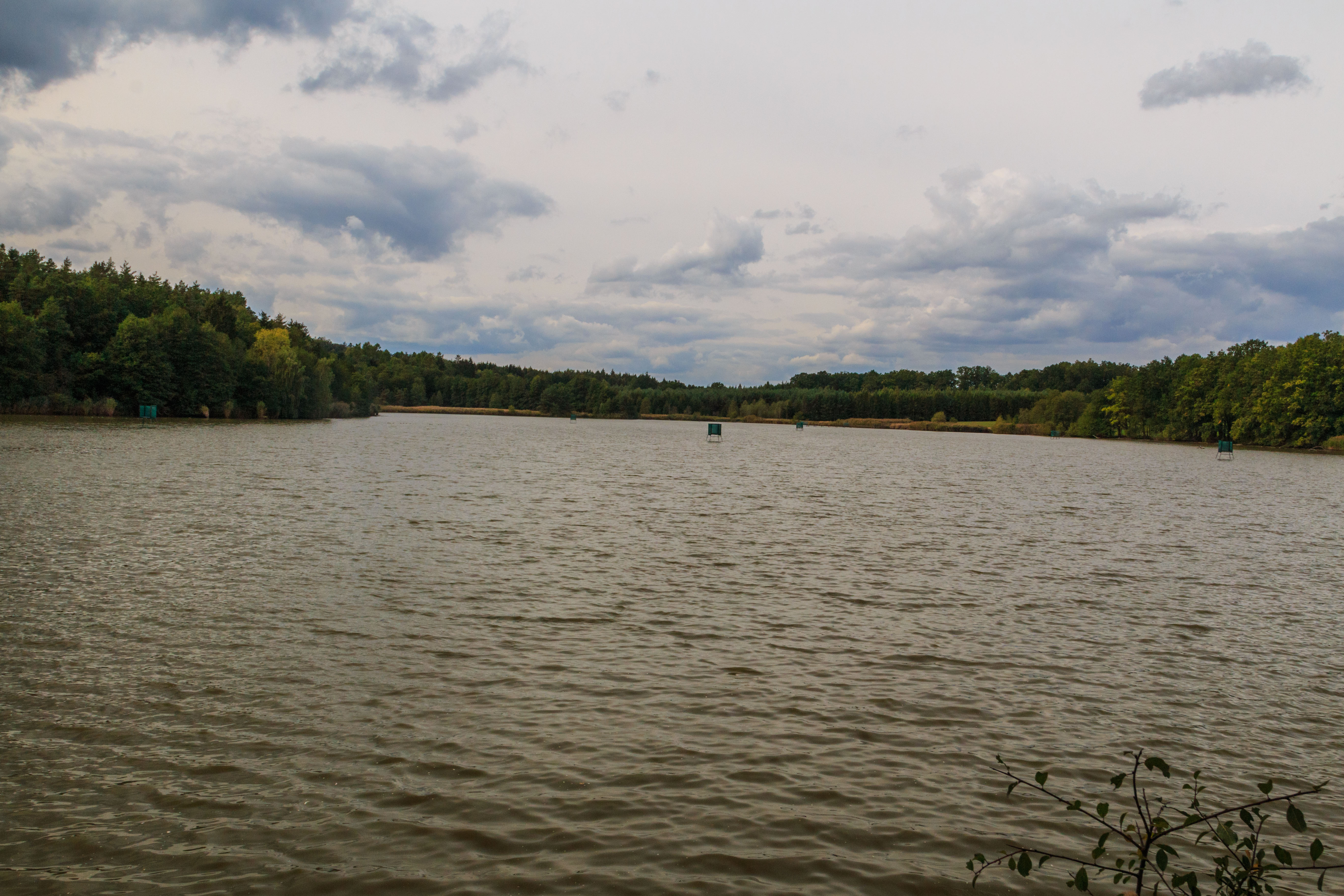 Žďárský rybník Project: Vodstvo.